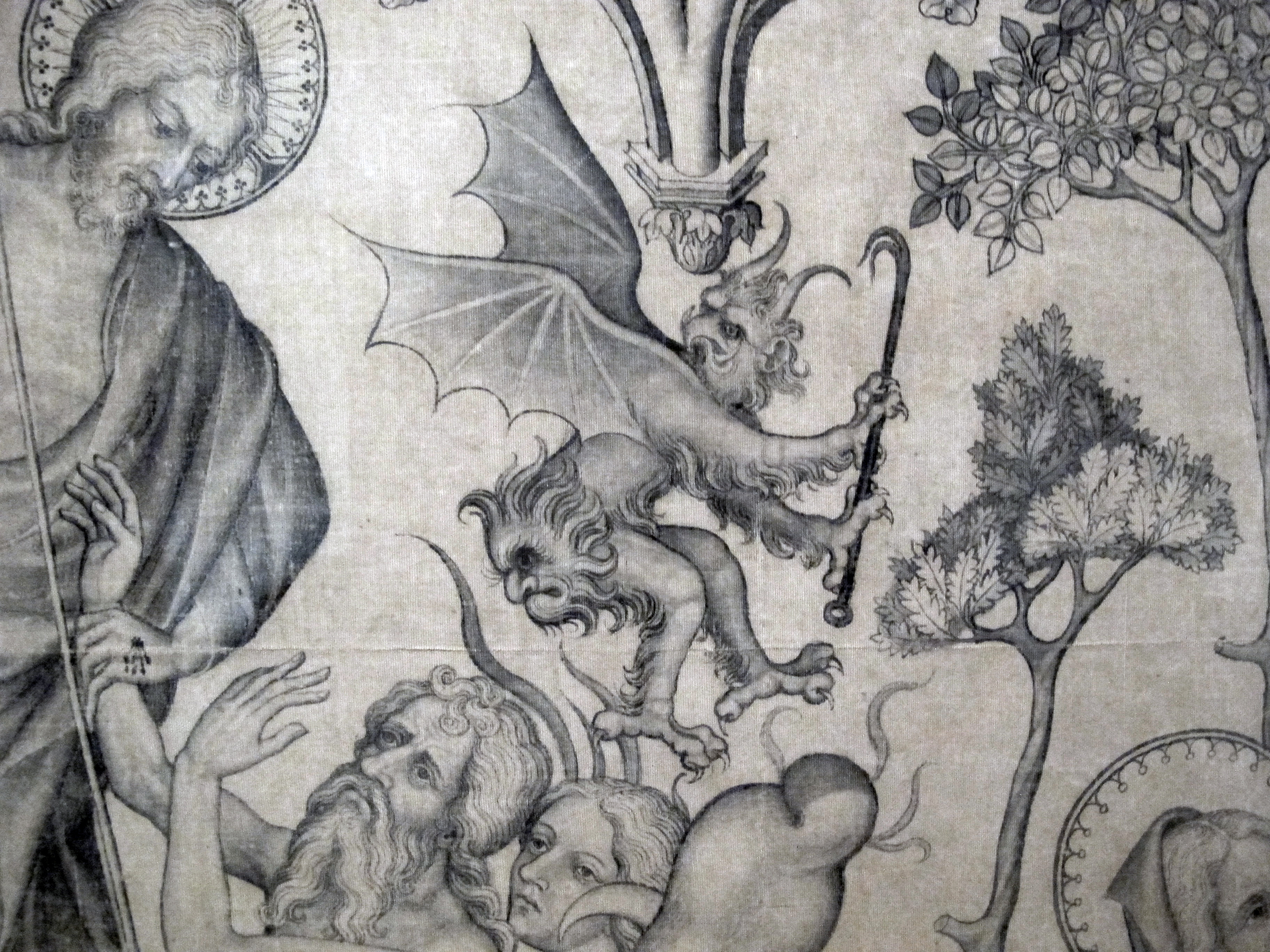 Dipinti francesi nel Louvre, Parigi, secc. XIV-XV